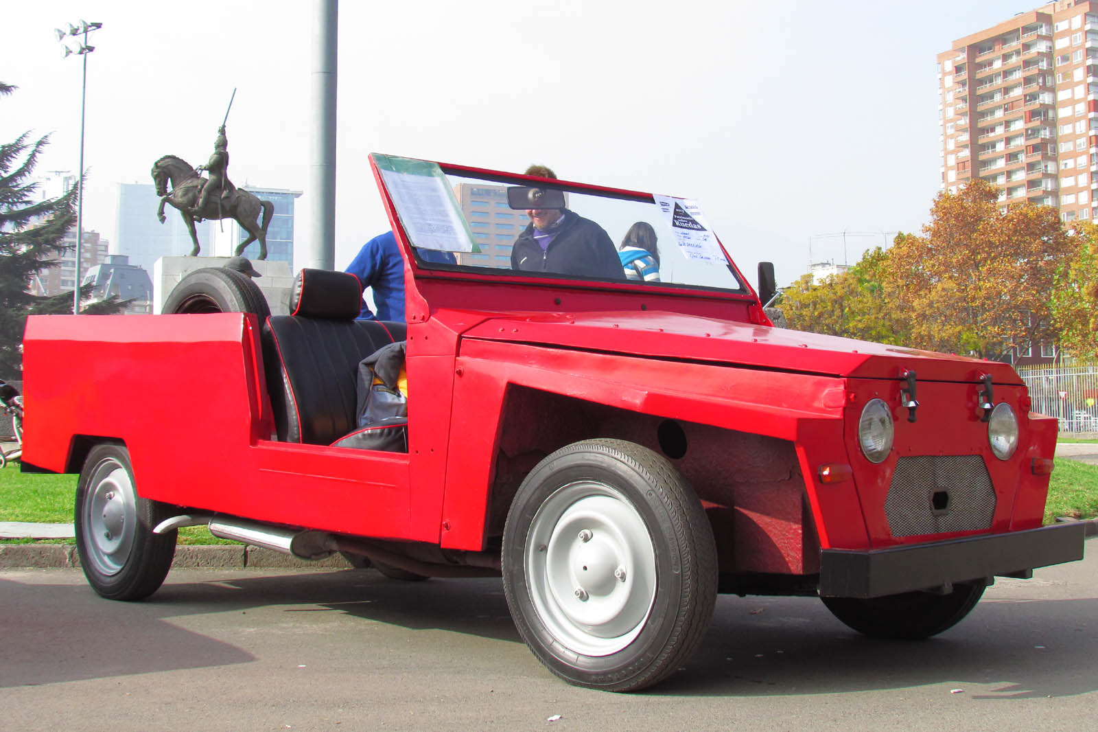 citroen yagan 74